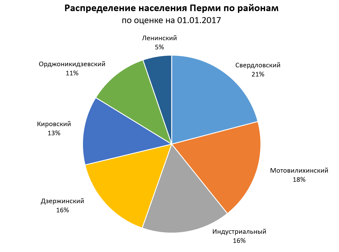 Распределение населения Перми по районам (на основе оценки численности населения на 01.01.2017 г.)